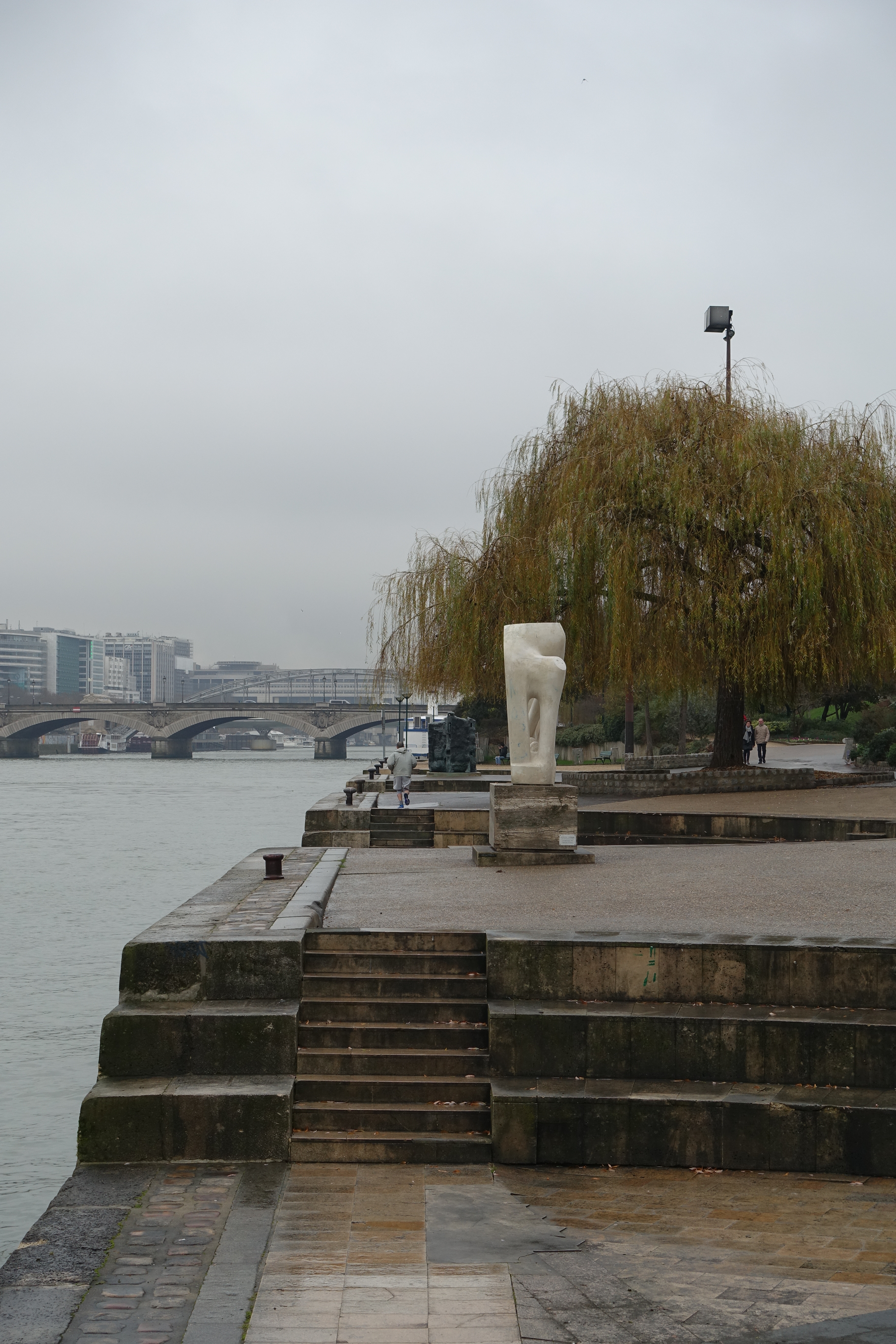 Musée de la sculpture en plein air, Jardin Tino-Rossi, Paris.